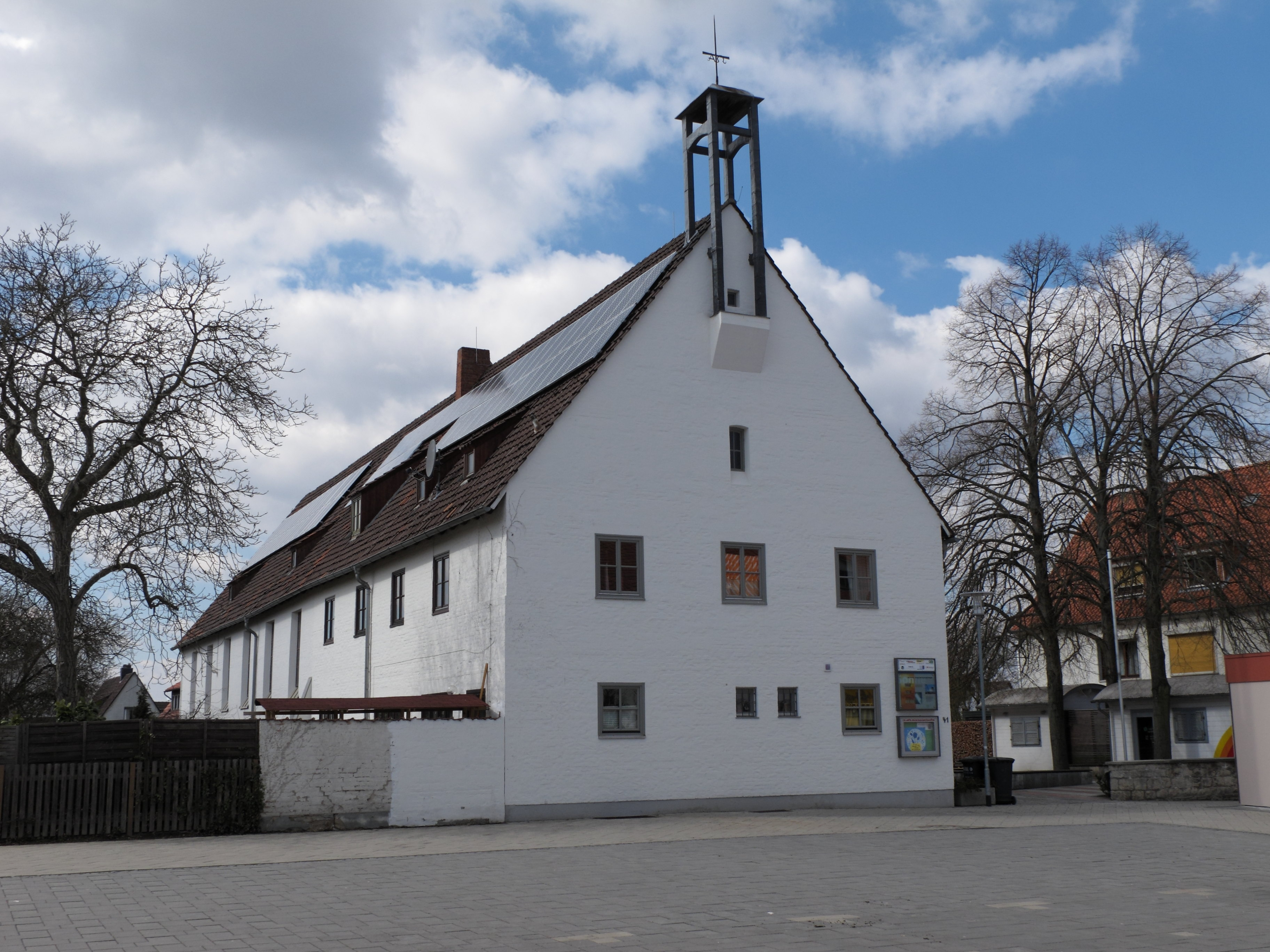 Braunschweig Lehndorf, evangelisch-lutherische Wichernkirche. Der vorderste Teil ist das Pfarrhaus, dahinter schließt sich als seine Verlängerung der eigentliche Saalbau an. Architekt: Gustav Gsaenger. Errichtung: 1937 - 1940.